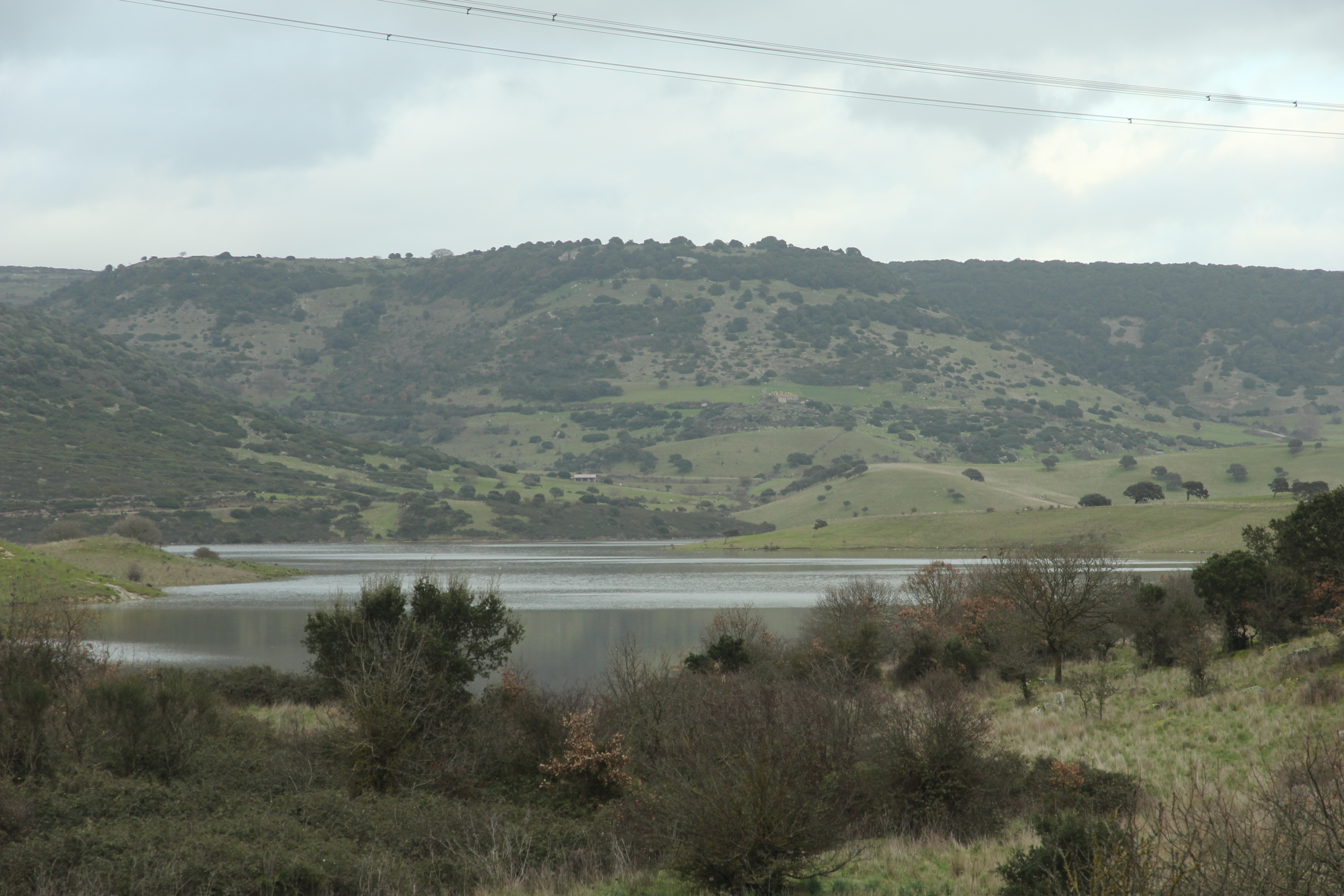 Bessude - Thiesi - Lago Bidighinzu